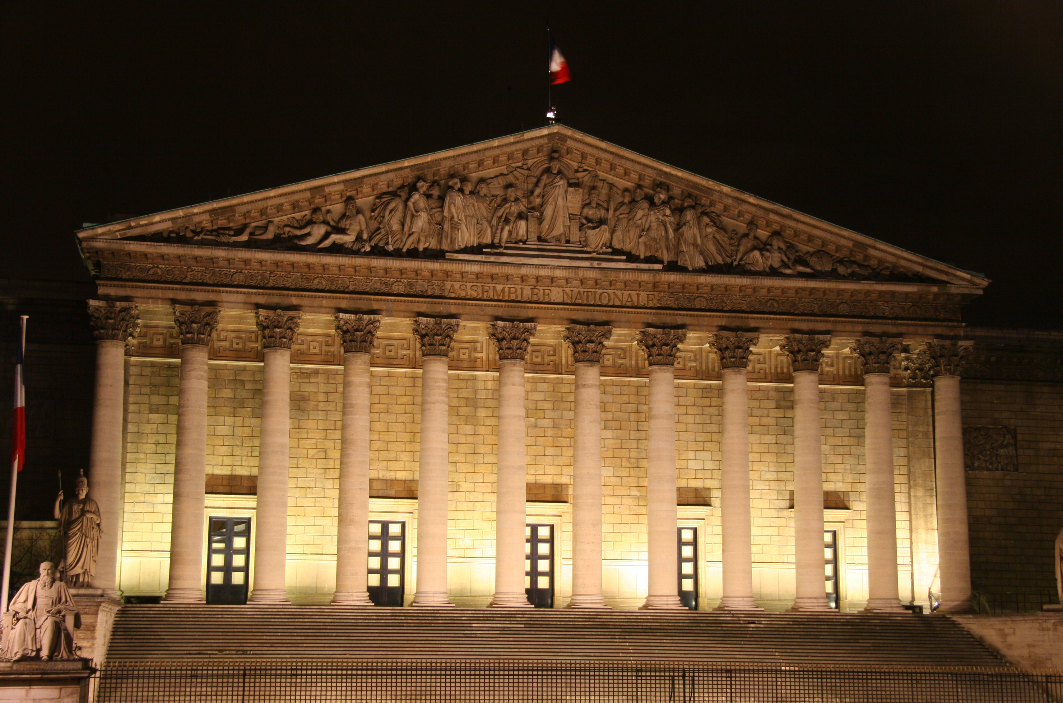 Palais Bourbon, siège de l'Assemblée nationale, Paris.